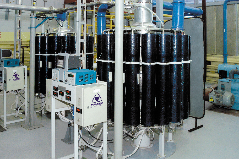 Мембранная азотная установка ГРАСИС